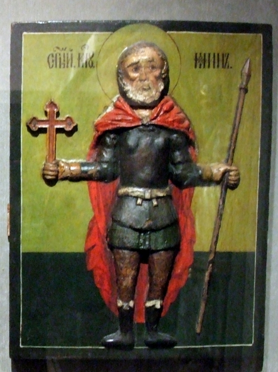 Святой Мина. К. 17 - нач. 18 в.